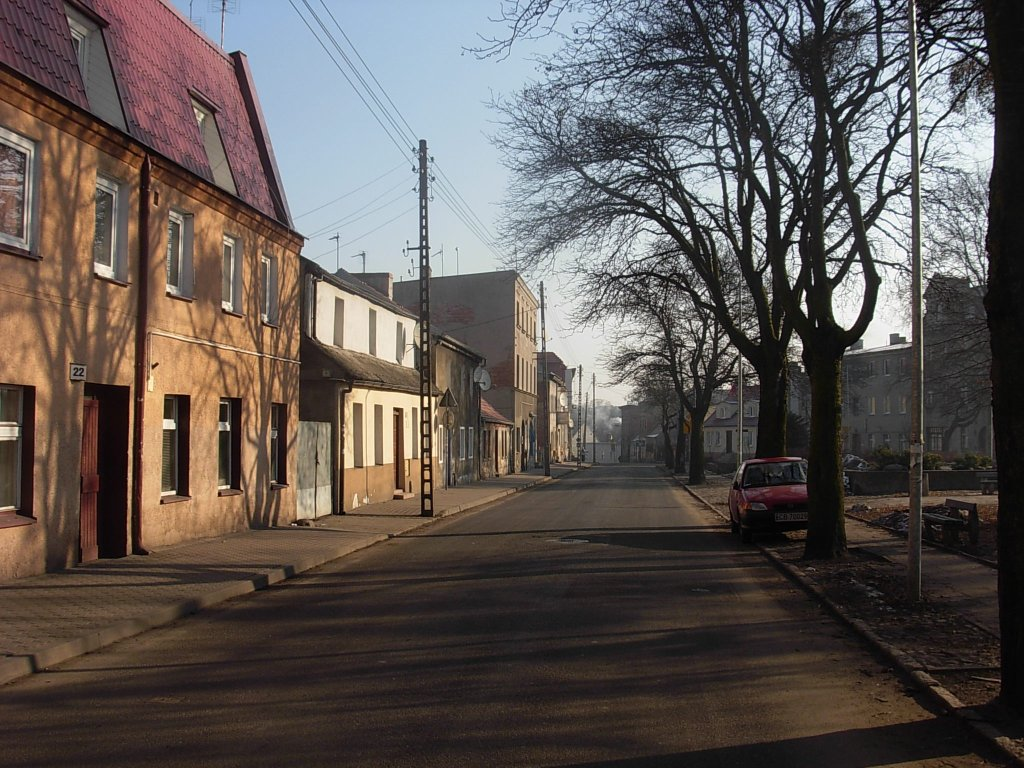 Ulica Orla na Szwederowie w Bydgoszczy